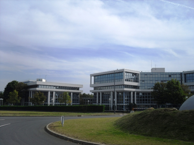 Le siège d'Arianespace à Courcouronnes (91)